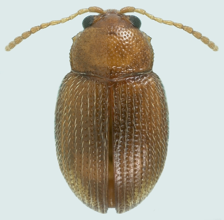 Epitrix hirtipennis (Melsheimer, 1847), altise du tabac, adulte, vue dorsale.